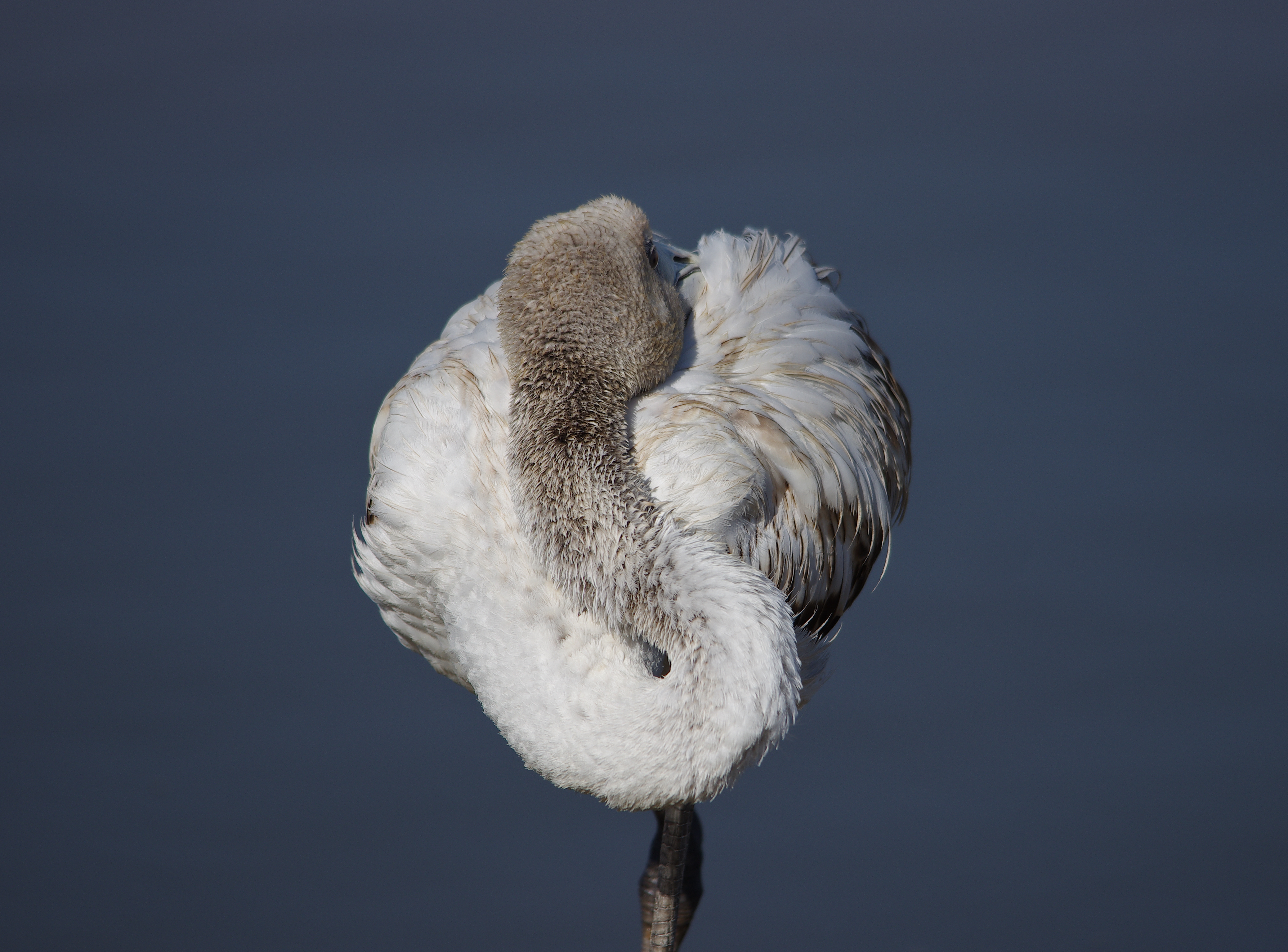 Flamant rose juvénile en plein sommeil